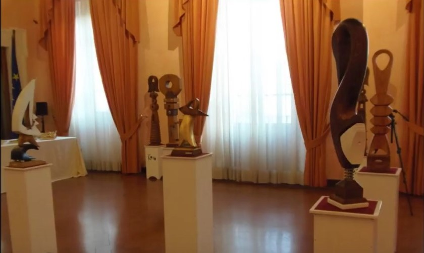 Mostra Personale di Claudio Cavallini a Pontassieve Sala dell'Eroine